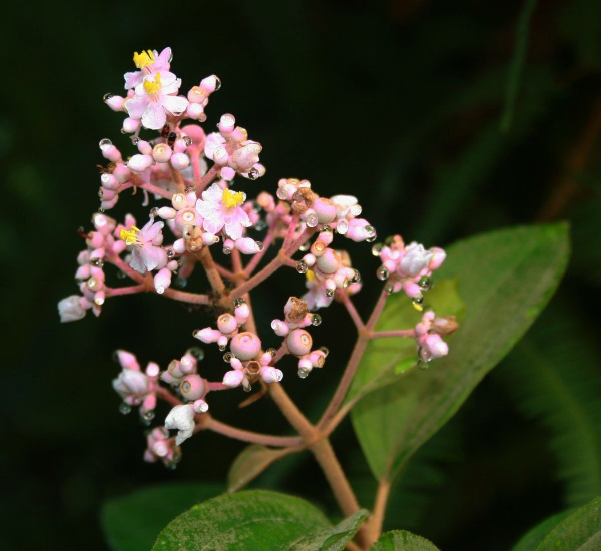 Conostegia xalapensis, Schwarzmundgewächse (Melastomataceae) - Costa Rica: Prov. Puntarenas, La Gamba NW Golfito, "Fila Trail" bei "Tropenstation La Gamba"/"Estación Biológica La Gamba"